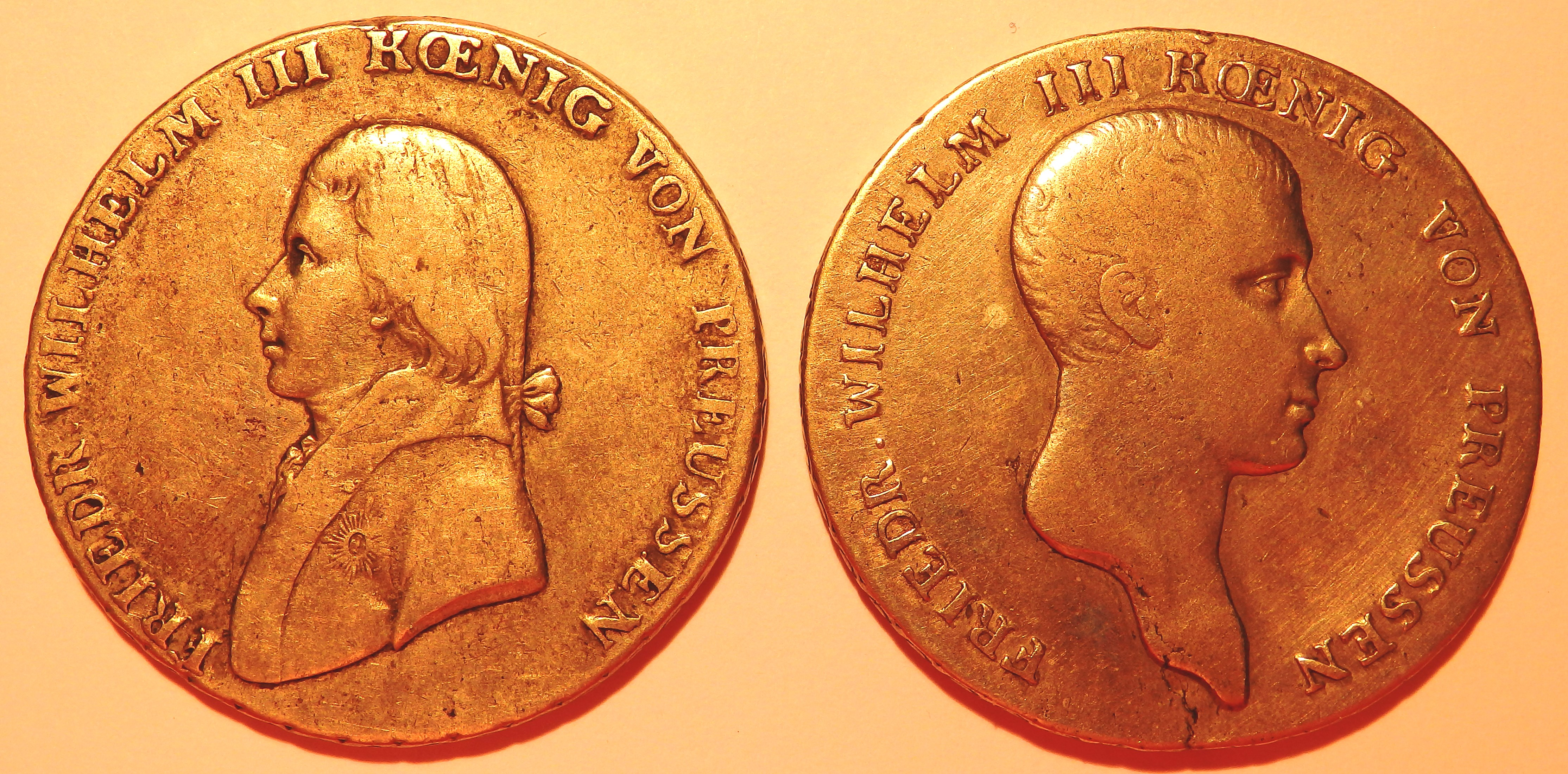 Friedrich Wilhelm III. v. Preußen mit Zopf (Taler Jahr 1801) und Kurzhaarfrisur (Taler 1814)